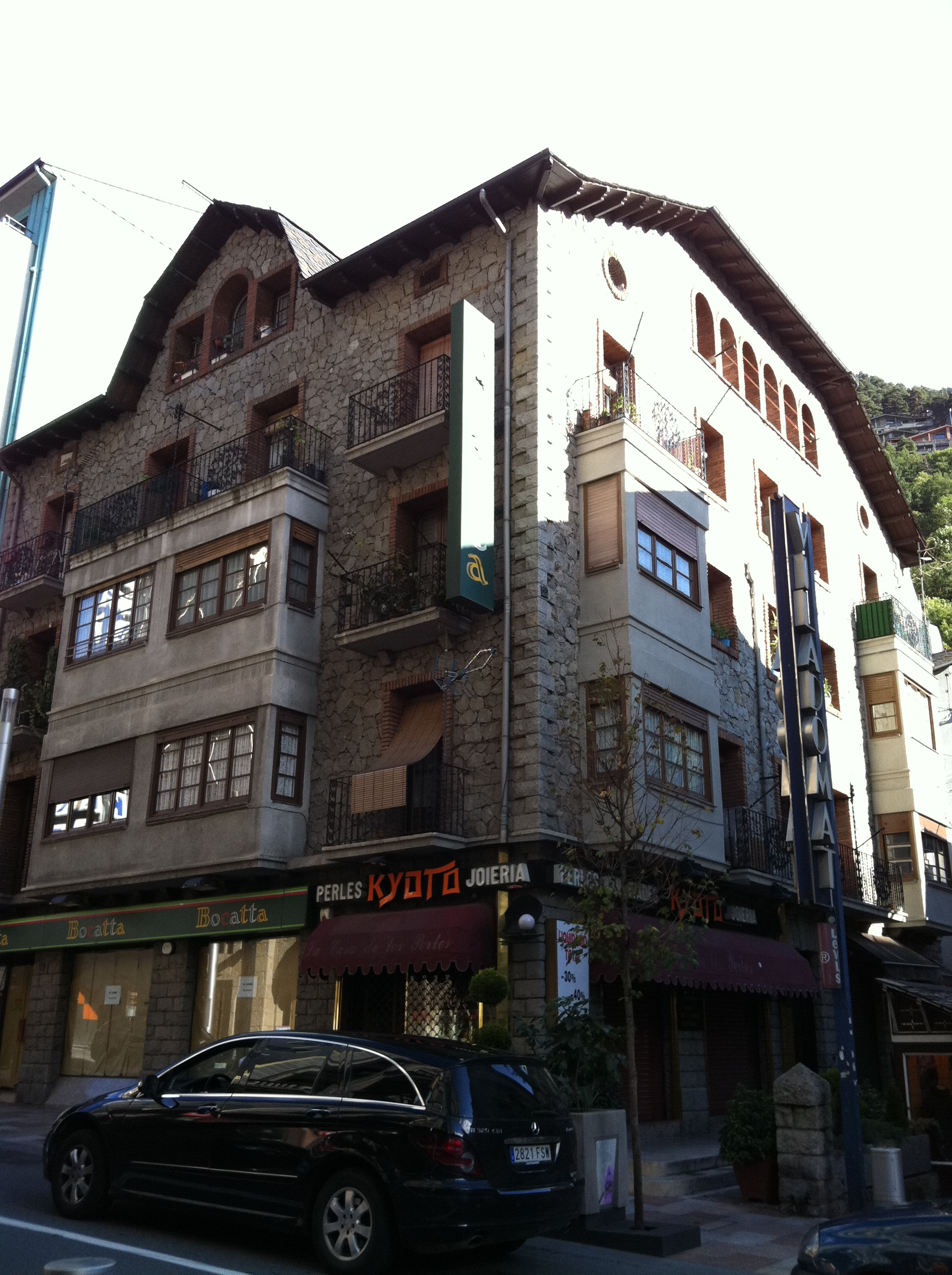 Casa Vidal